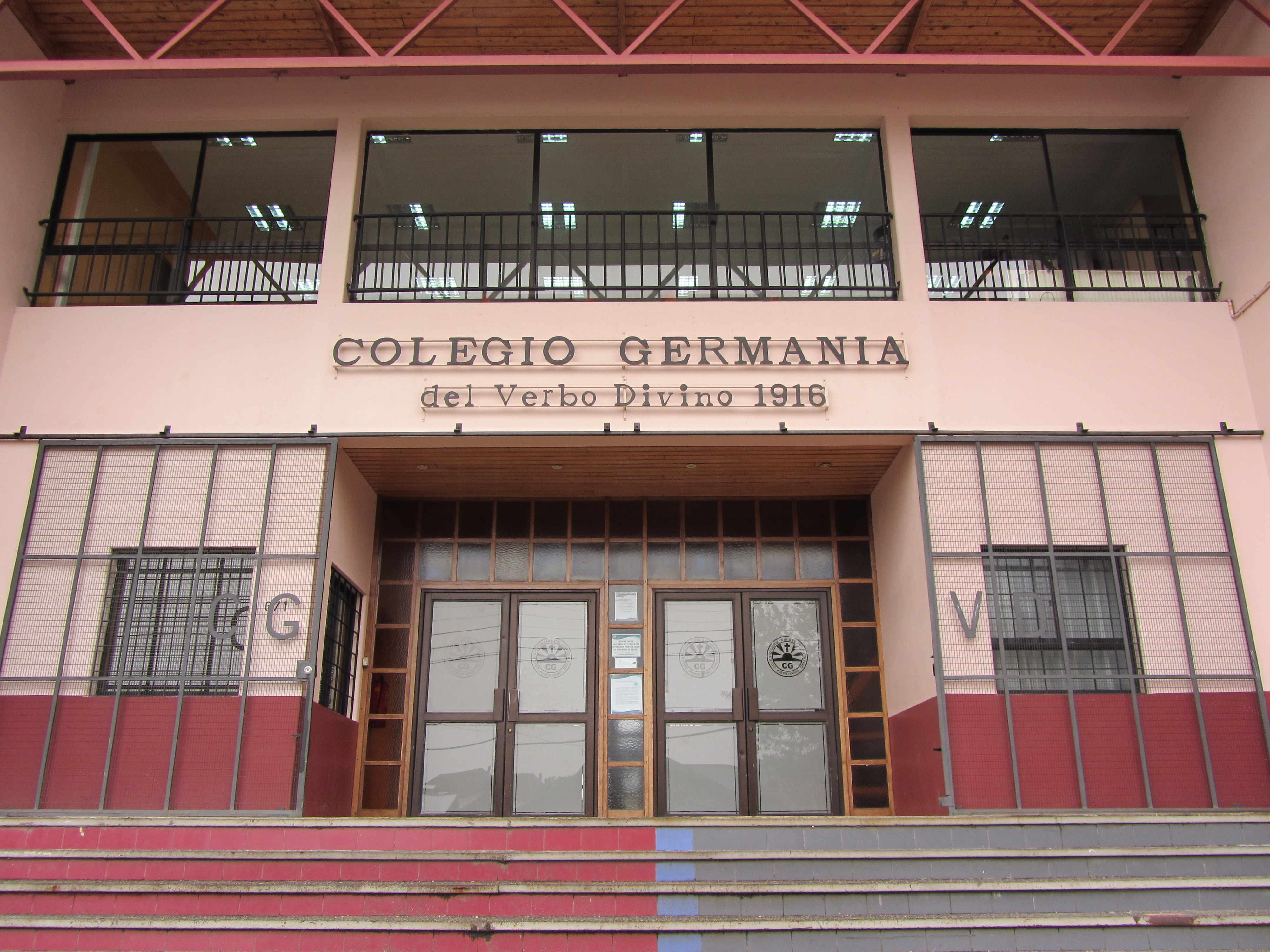 Colegio Germania de la congrecación del Verbo Divino, ubicado en la ciudad de Puerto Varas, Chile.